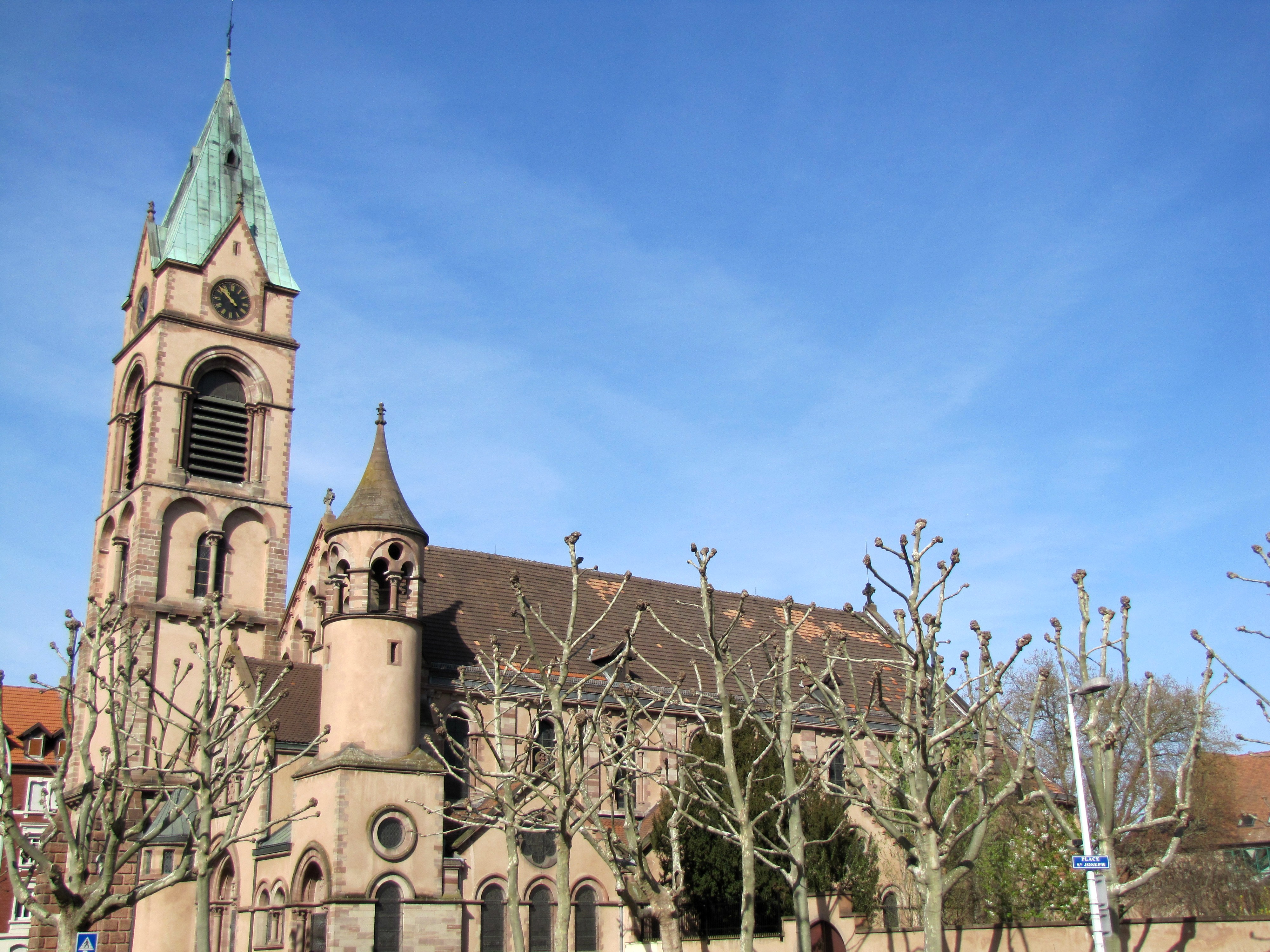 Alsace, Bas-Rhin, Église catholique Saint-Joseph (1900) de Strasbourg-Koenigshoffen.